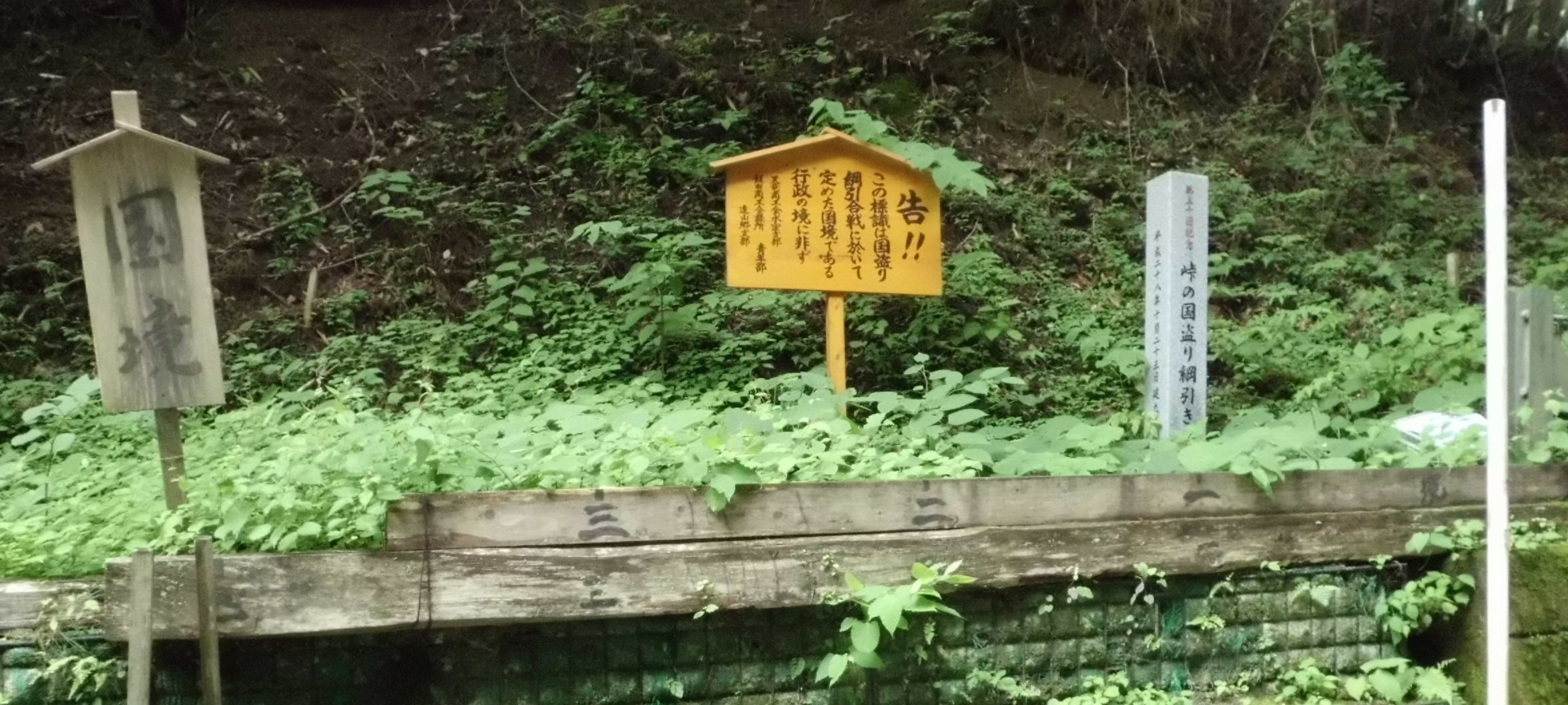 国境を示す立て札,行政の県境ではない旨を伝える立て札,記念碑が並んで設置されている。2017年7月30日撮影。